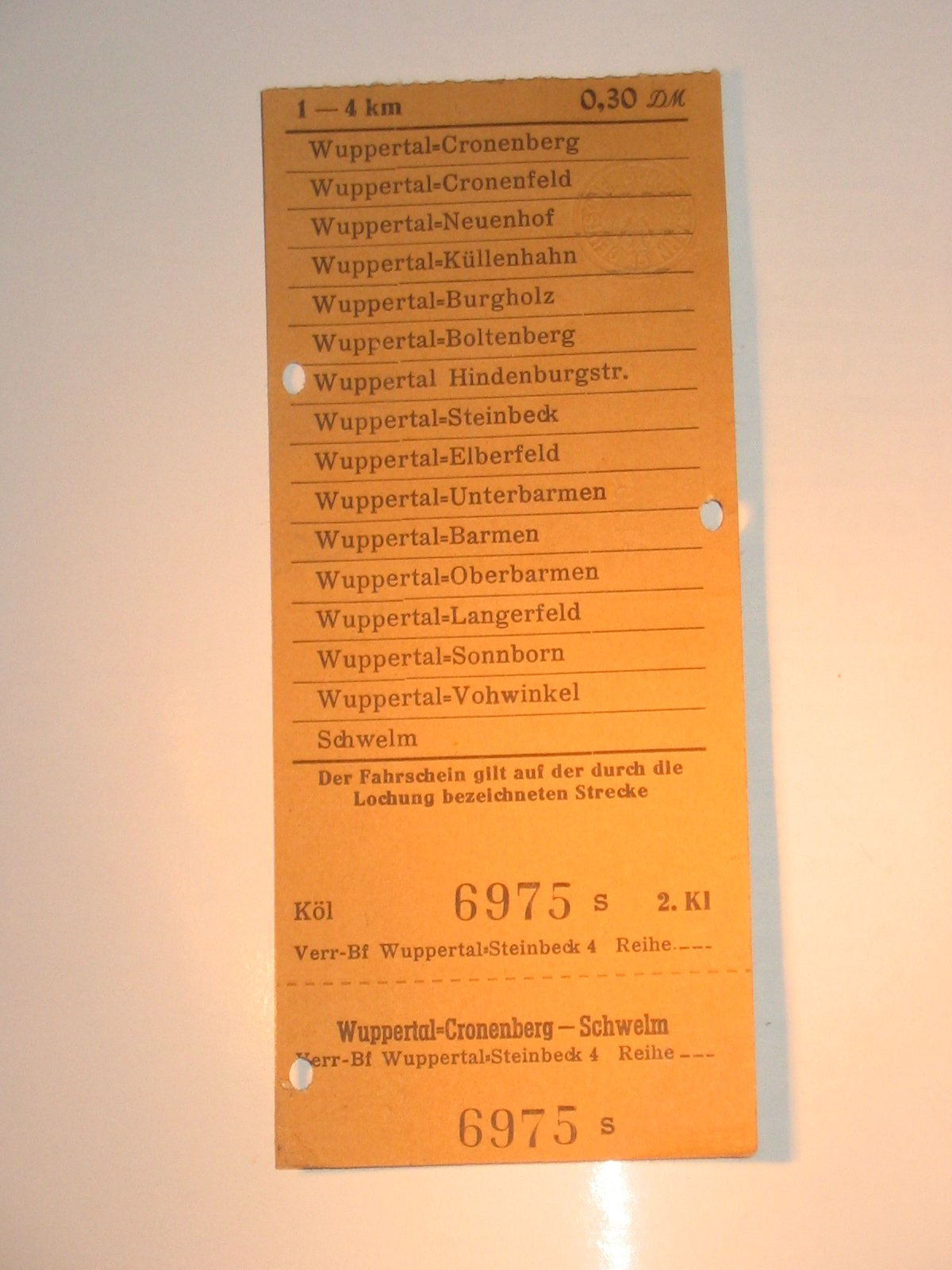 Fahrkarte für die Bahnstrecke Cronenberg - Elberfeld, vermutlich 60er Jahre